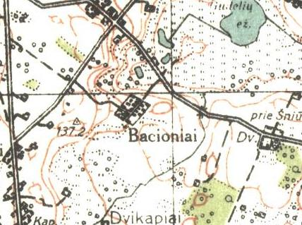 Деревня Бацёняй. Фрагмент литовской топографической карты 1923-1938 гг. Масштаб: 1:100000)